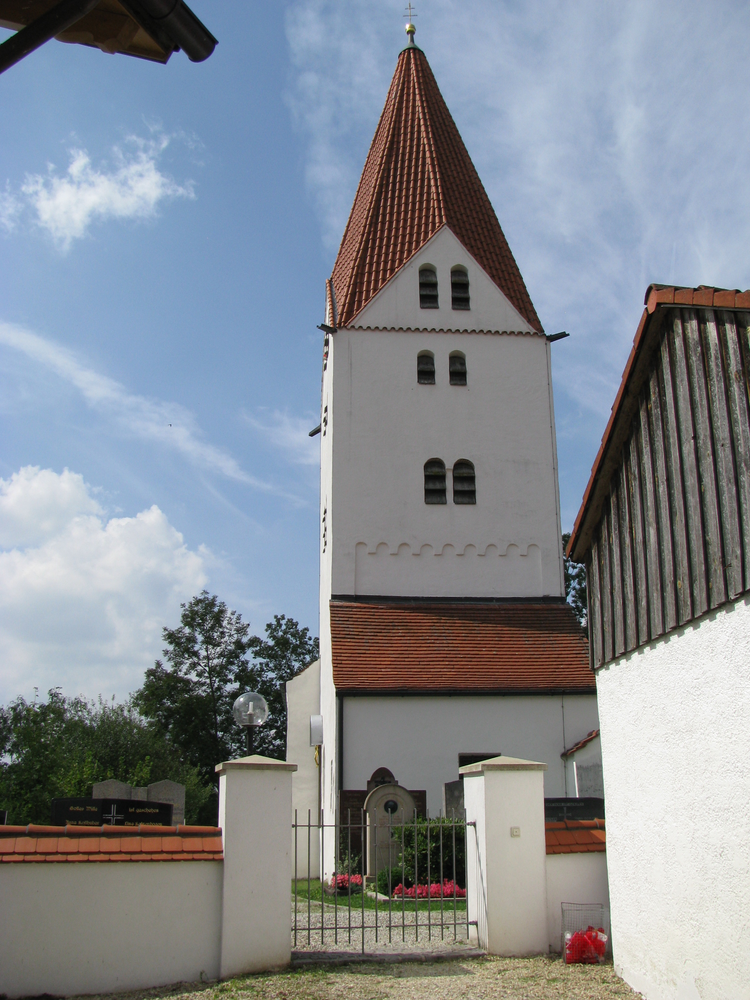 Filialkirche St. Peter und Paul in Tünzhausen, Landkreis Freising, Ansicht von Südosten